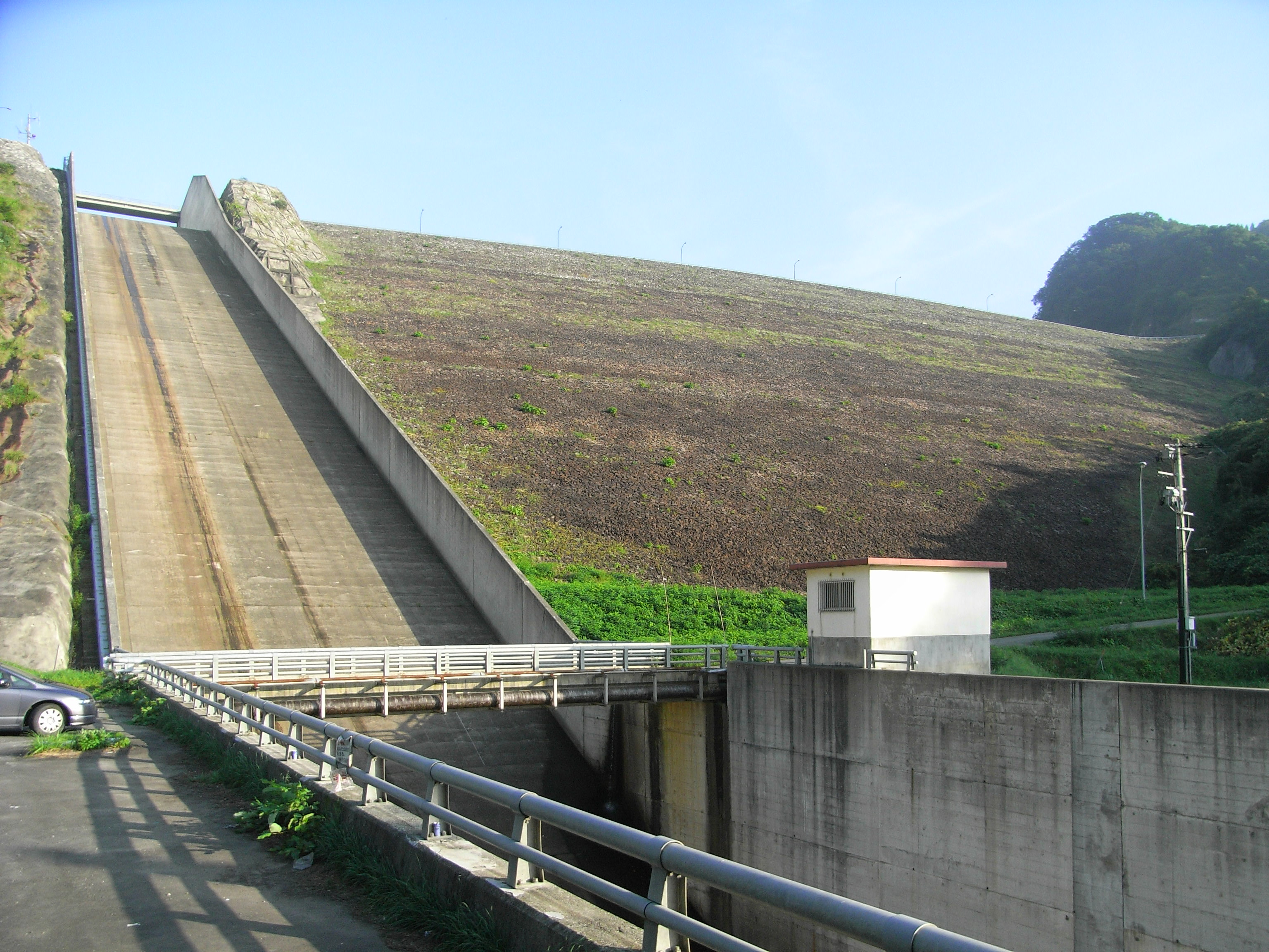 Dam